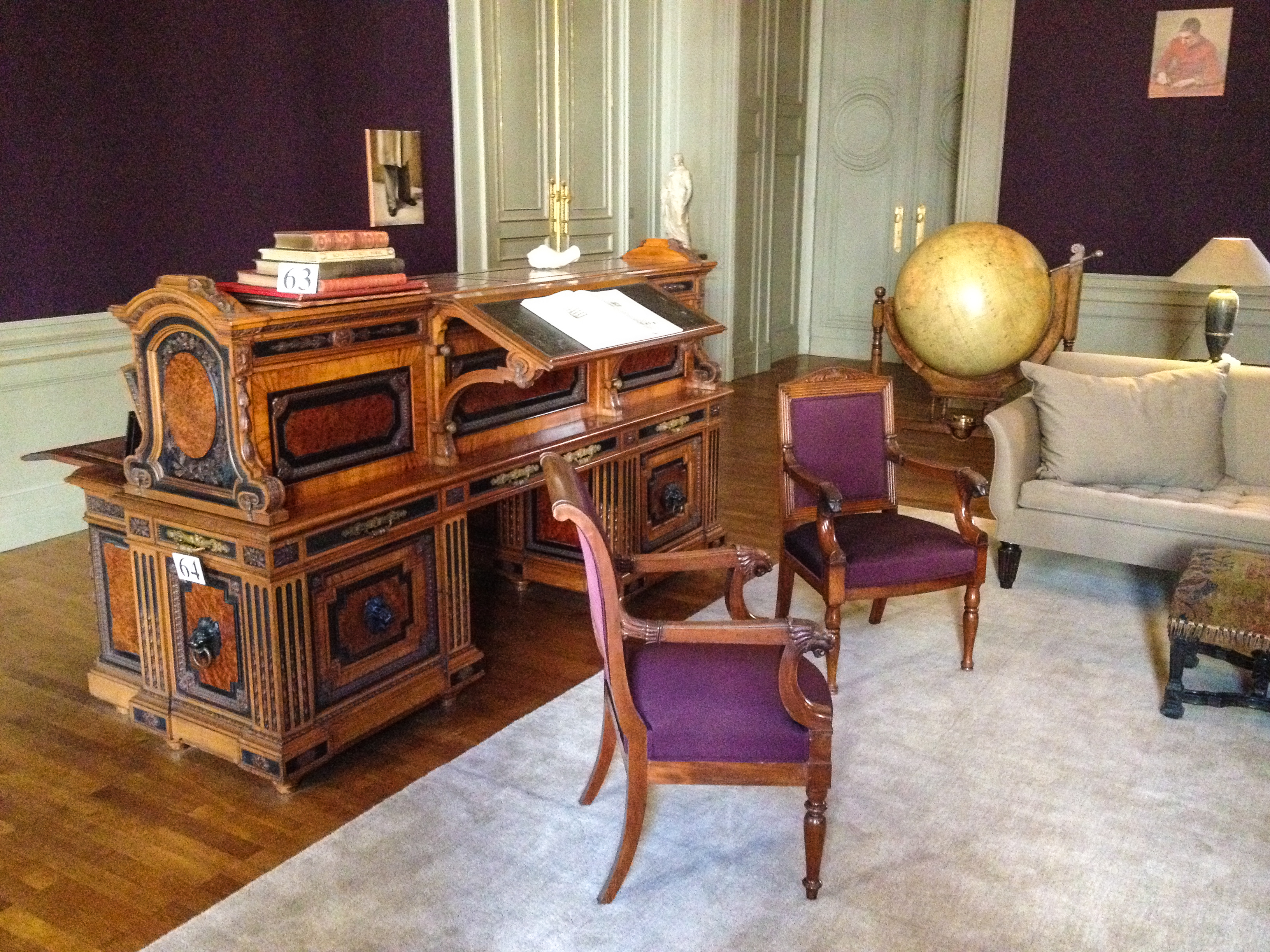 The Royal Palace of Brussels (Dutch: Koninklijk Paleis van Brussel